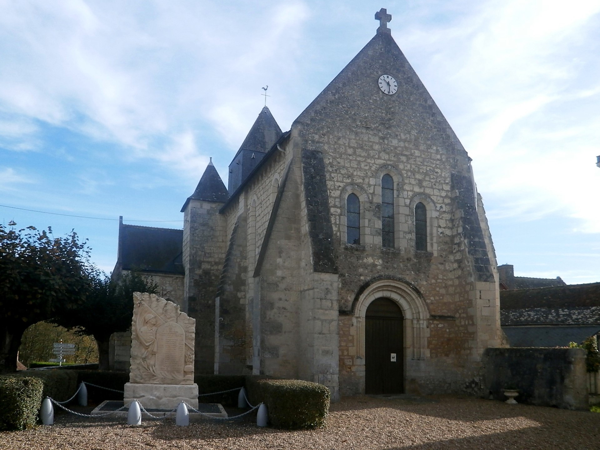 Vue de la façade ouest de l'église d'Epeigné-les-Bois